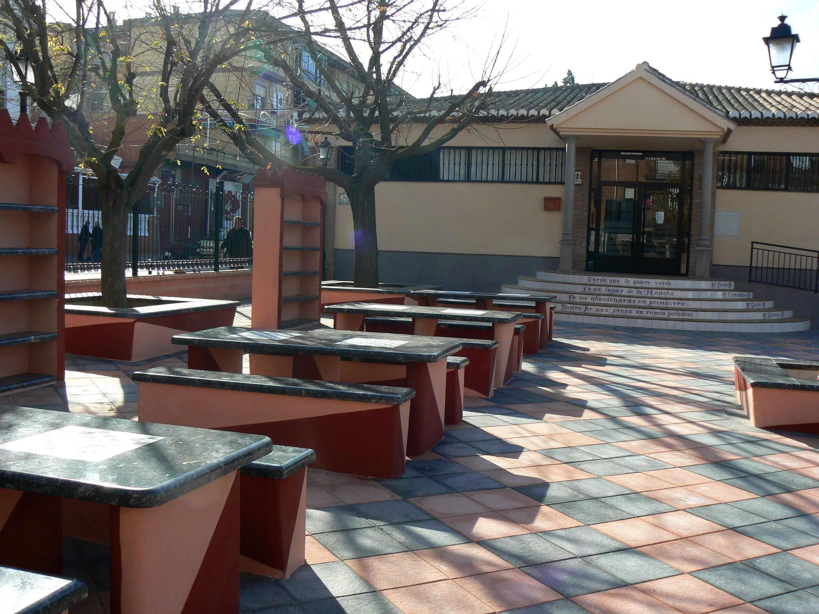 La biblioteca de La Zubia tras la remodelación llevada a cabo un año antes de la toma de la foto. Desde entonces, la iglesia se encuentra dentro del Parque de La Encina y no colindante, por lo que no se puede acceder al área mostrada en la fotografía si el parque se encuentra cerrado. En las escaleras de la entrada hay versos de famosos poemas. En los armarios exteriores hay libros que cualquiera dentro del parque puede tomar y leer en cualquier momento.